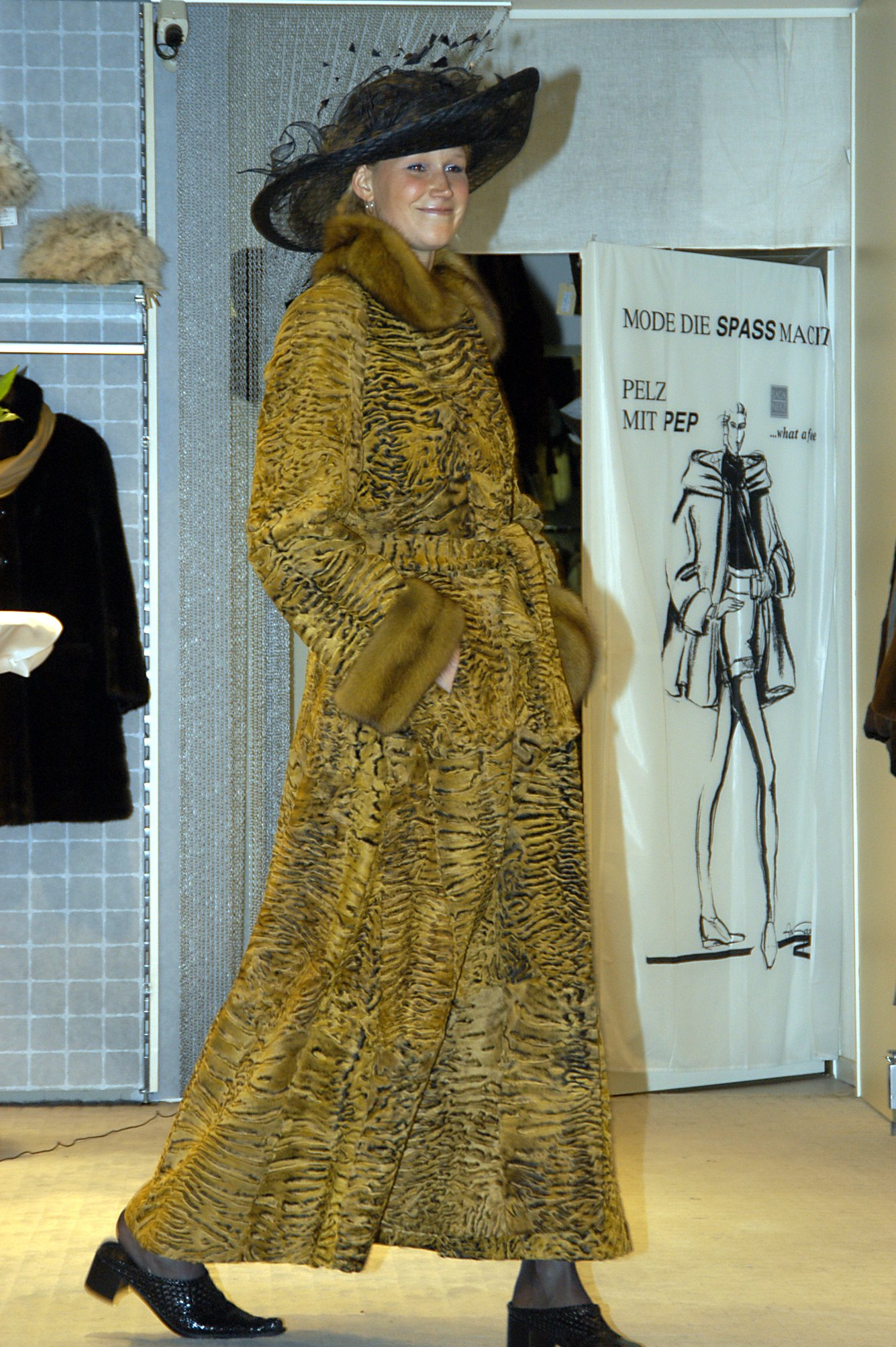 Modenschau der Firma Pelzmodelle Kuhn, Düsseldorf. Anlässlich des hundertjährigen Firmenjubiläums. Gefärbter Swakara-Persianermantel mit Zobelbesatz- und manschetten und Persianerrock (Design Lubert, Köln).